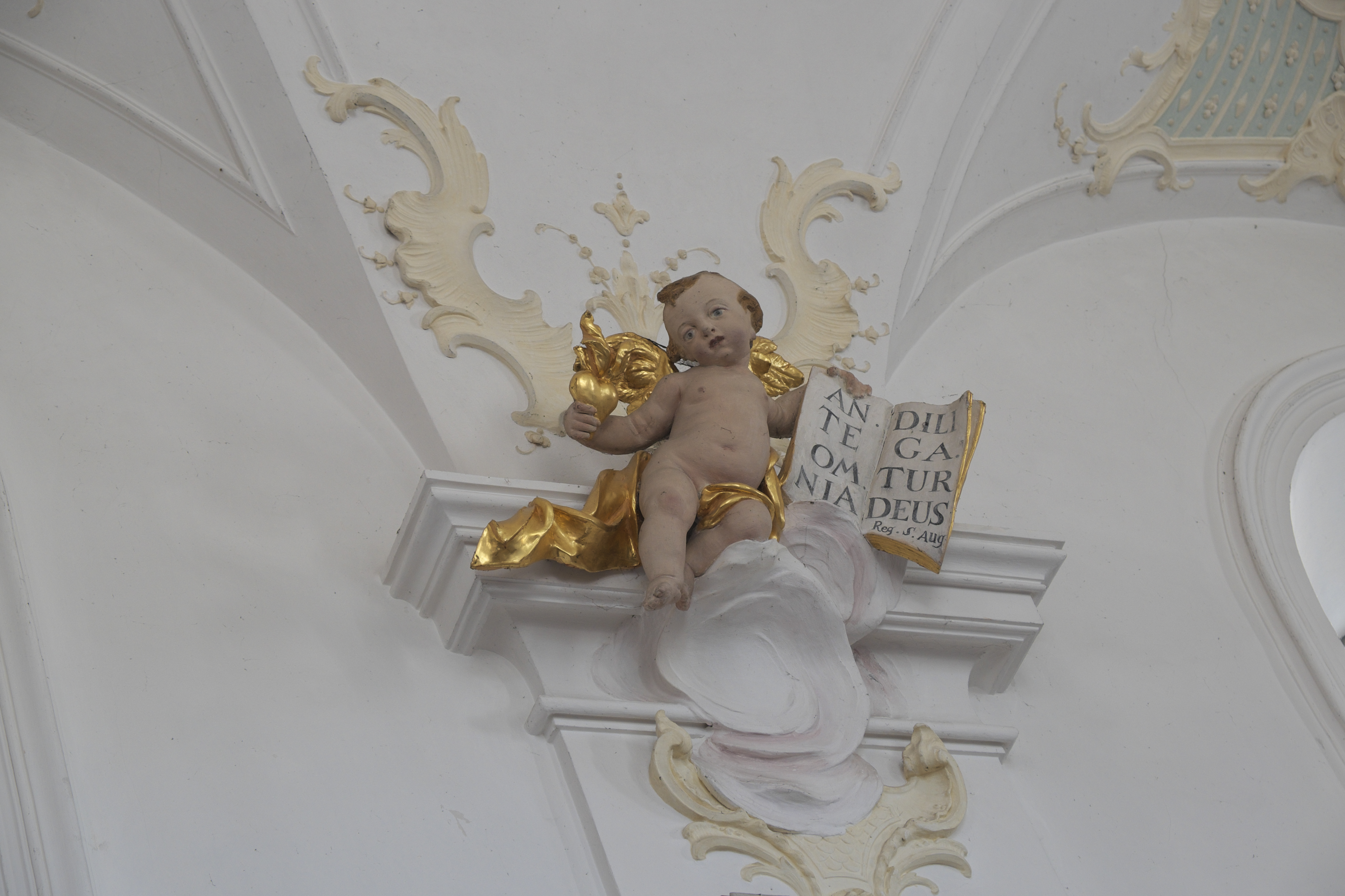 Katholische Filialkirche St. Alabn in Dießen am Ammersee im Landkreis Landsberg am Lech (Bayern/Deutschland), Putto über der Kanzel